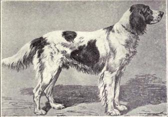 French Setter (French Spaniel) from 1915